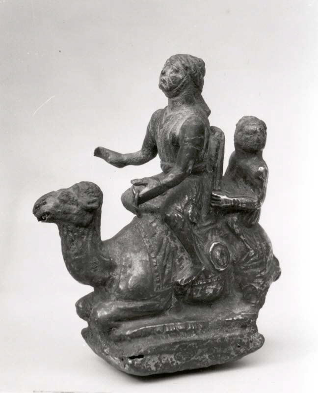 Nabataean; Sculpture; Metalwork-Sculpture